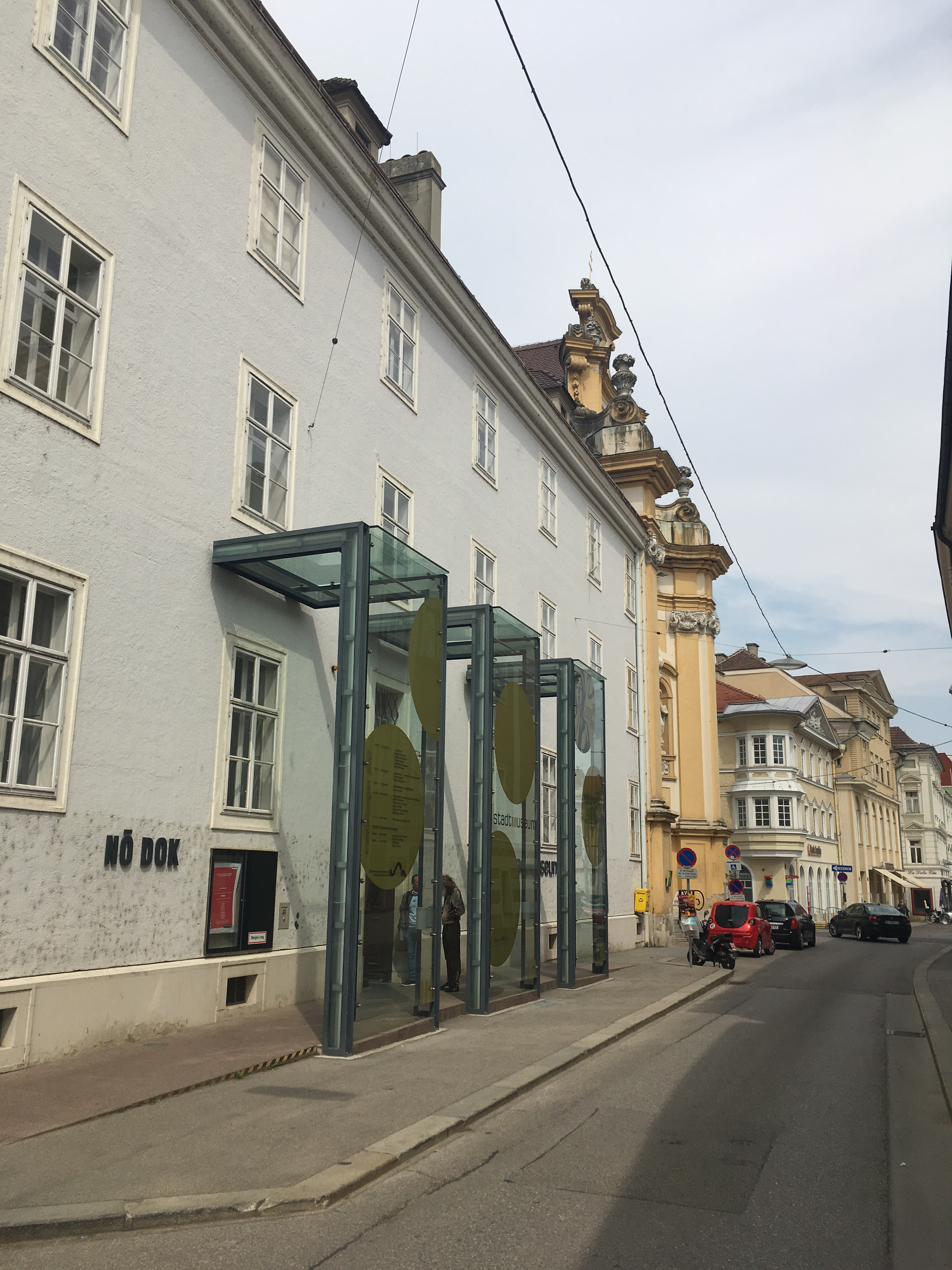 Stadtmuseum. St. Pölten, Richtung Rathausplatz gesehen